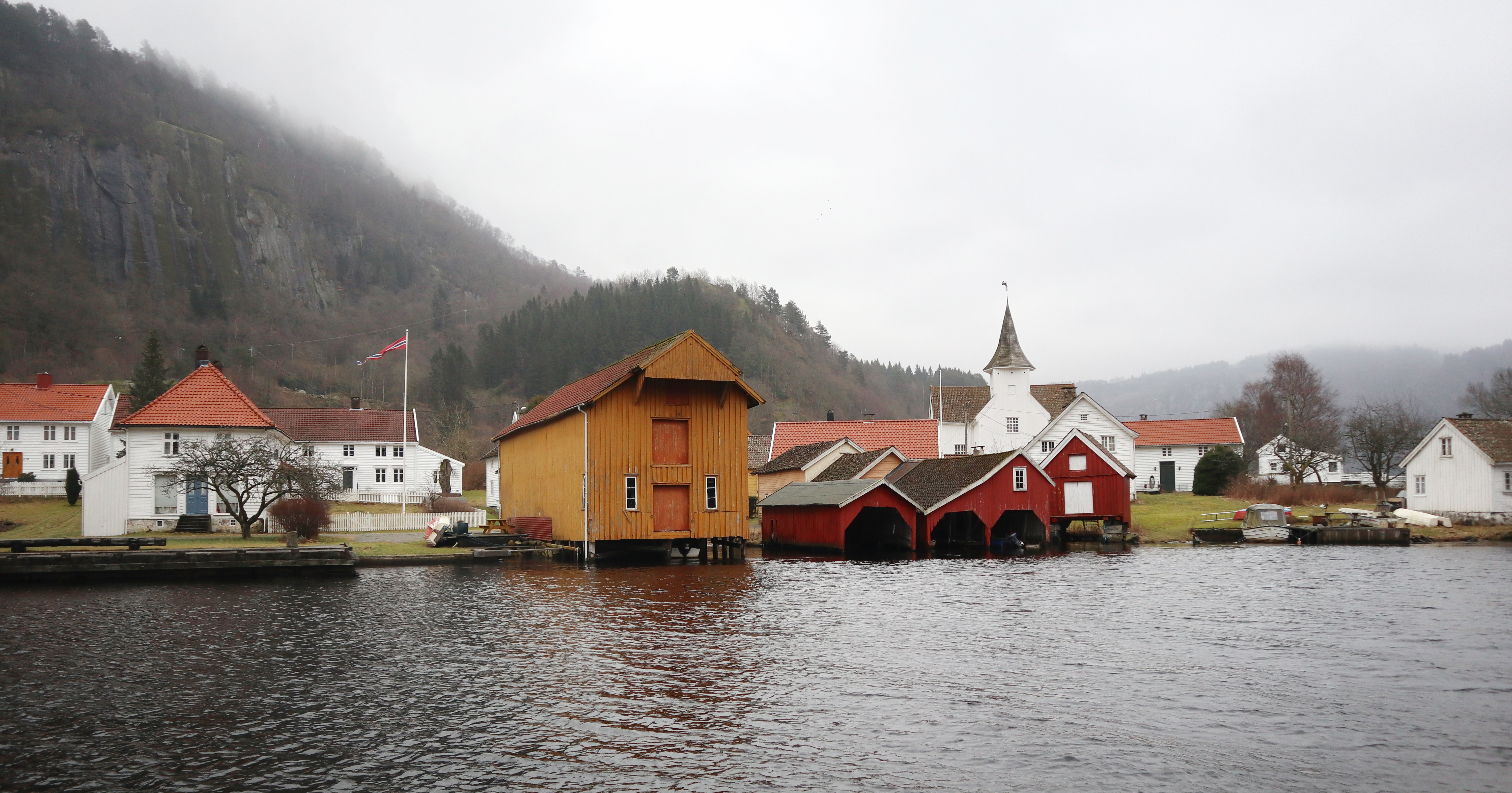 Fedaelva m bebyggelse